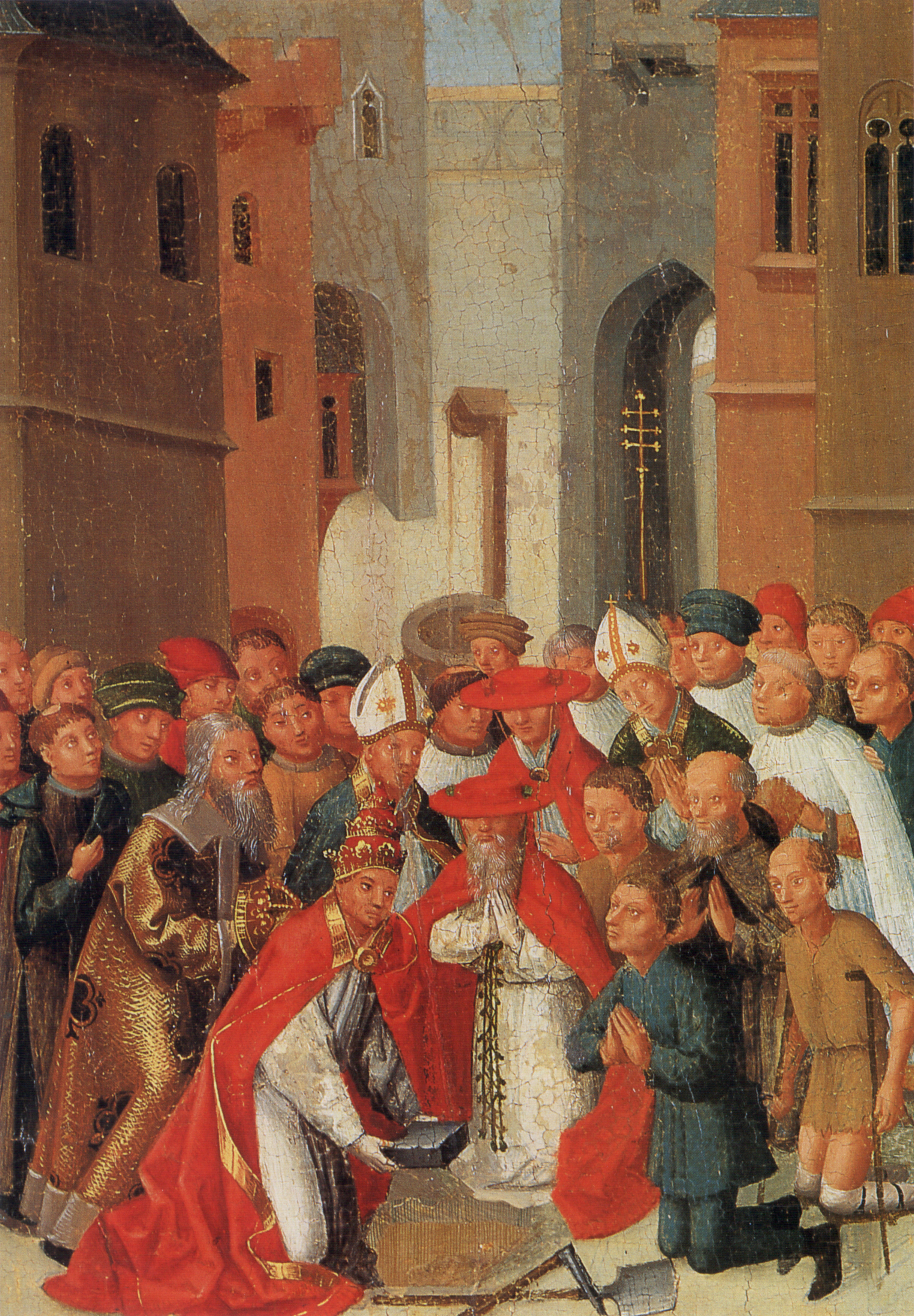 Weingartener Heilig-Blut-Tafel von 1489. Landesmuseum Württemberg, Stuttgart. Tafel 15: Die verborgene Reliquie wird entdeckt (rechts der kniende Adilbero, jetzt sehend)